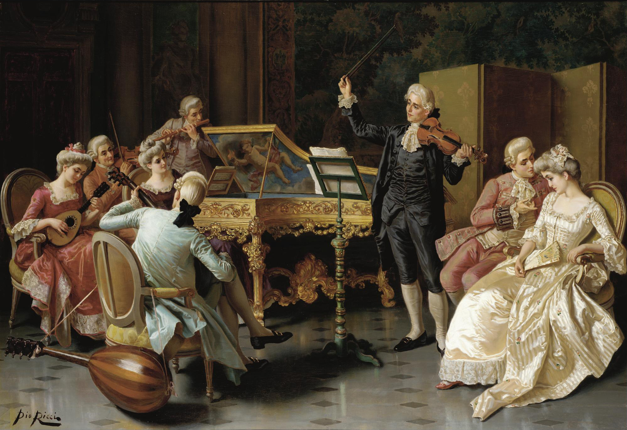 A private performance.